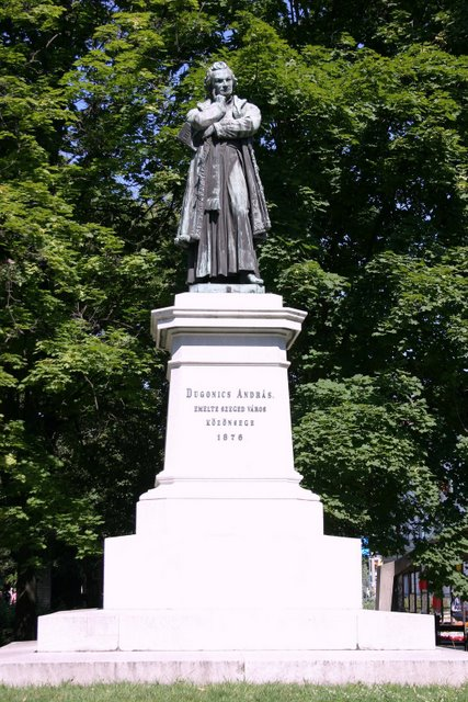 Dugonics András szobra